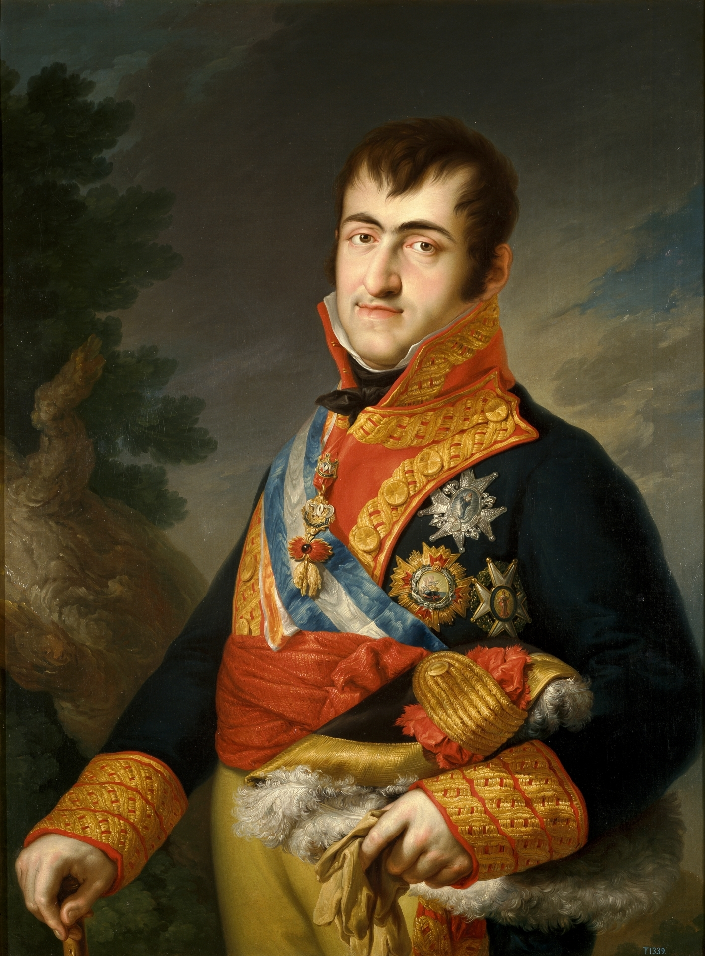 Retrato del rey Fernando VII de España (1784-1833), que aparece vestido con el uniforme de capitán general del ejército español.